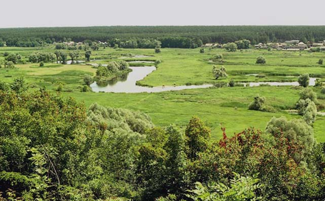 Гомільшанські ліси: Гомільшанські ліси